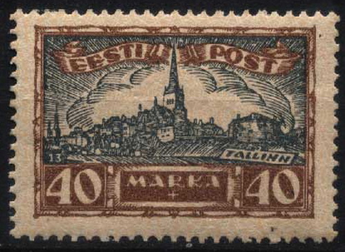 Почтовая марка Эстонии. Таллин, общий вид города, 1927